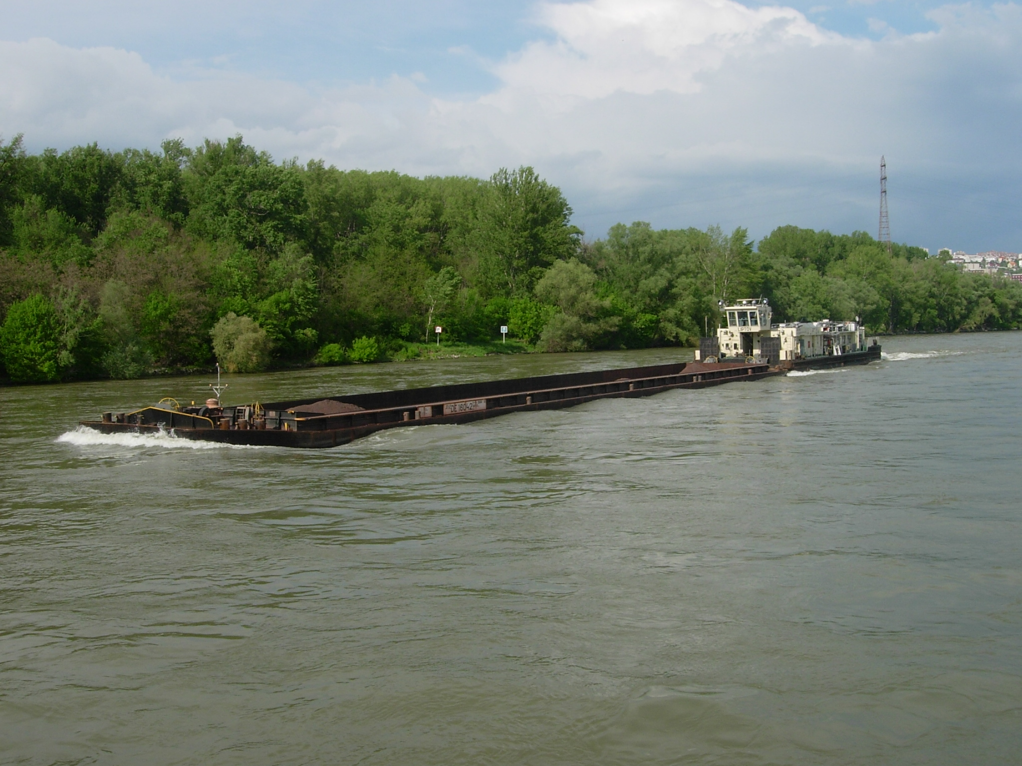 Containerschiff auf der Donau